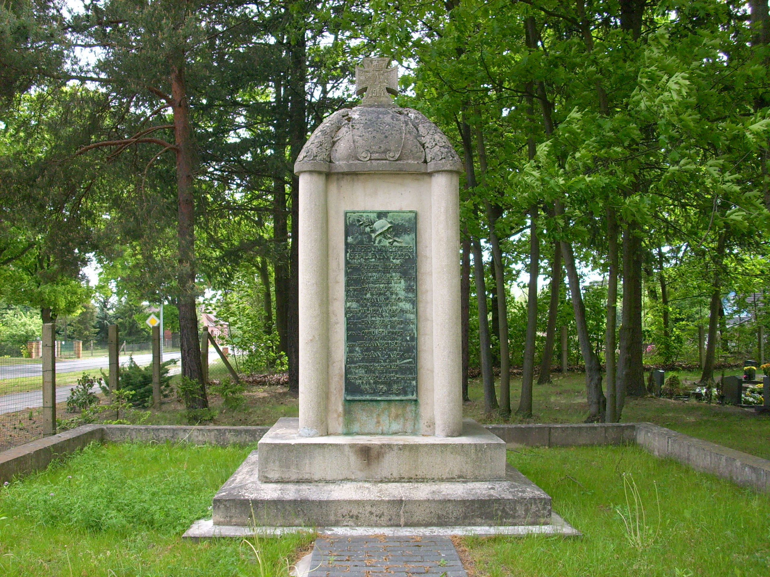 Kriegerdenkmal für die Gefallenen des Ersten Weltkriegs auf dem Friedhof in Burgneudorf (Spreetal) Hornjoserbsce: Pomnik za padnjenych Prěnjeje swětoweje wójny w Nowej Wsy pola Bórka.